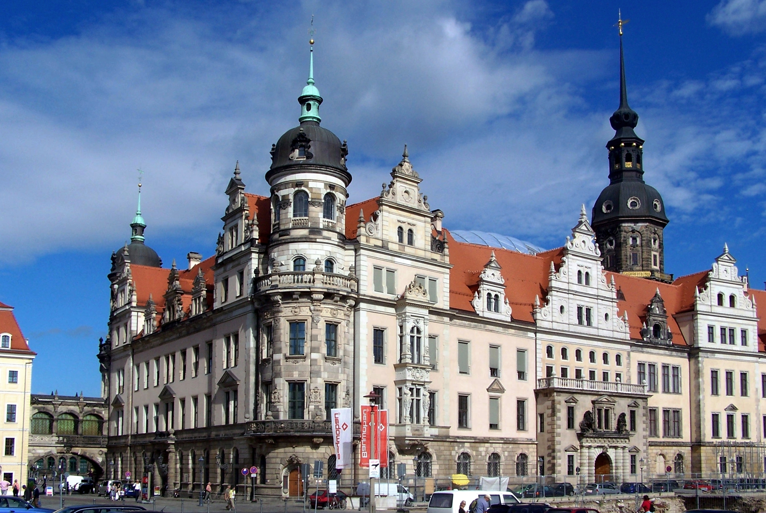 Fassade des Dresdner Residenzschlosses zur Schloßstraße